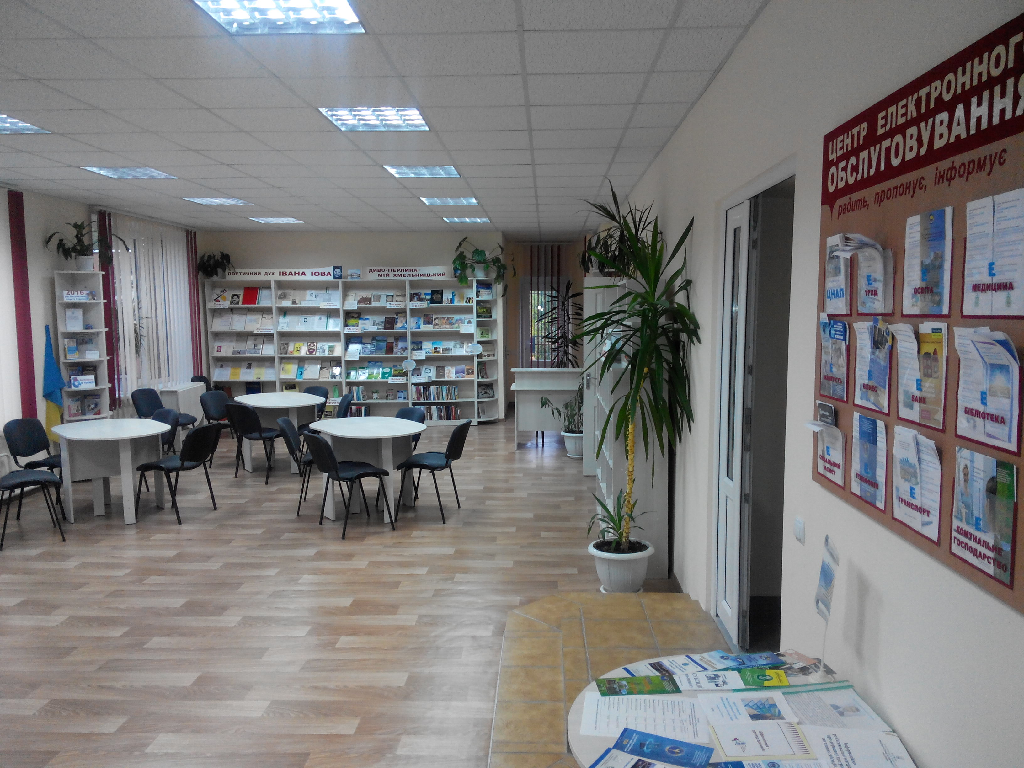 Читальний зал Бібліотека-філія №8 на Озерці